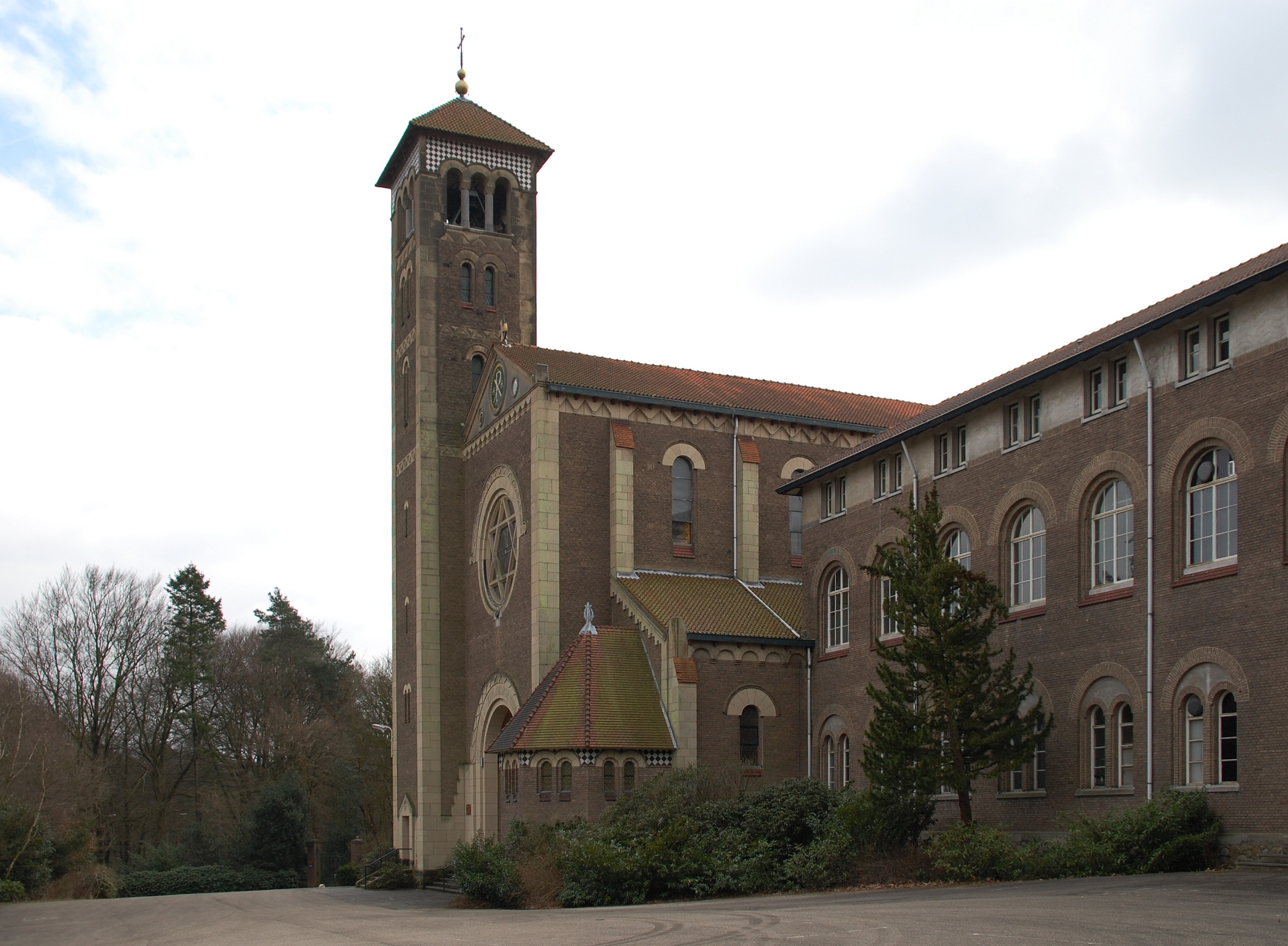 NeBo Klooster in Nijmegen Rapportage Rijksmonument (